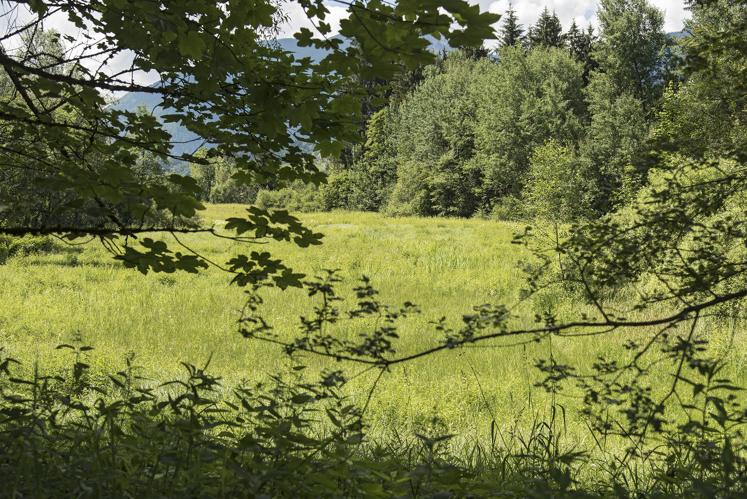 Wörgler Filz. This media shows the Geschützter Landschaftsteil in the Tyrol with the ID {1 }.